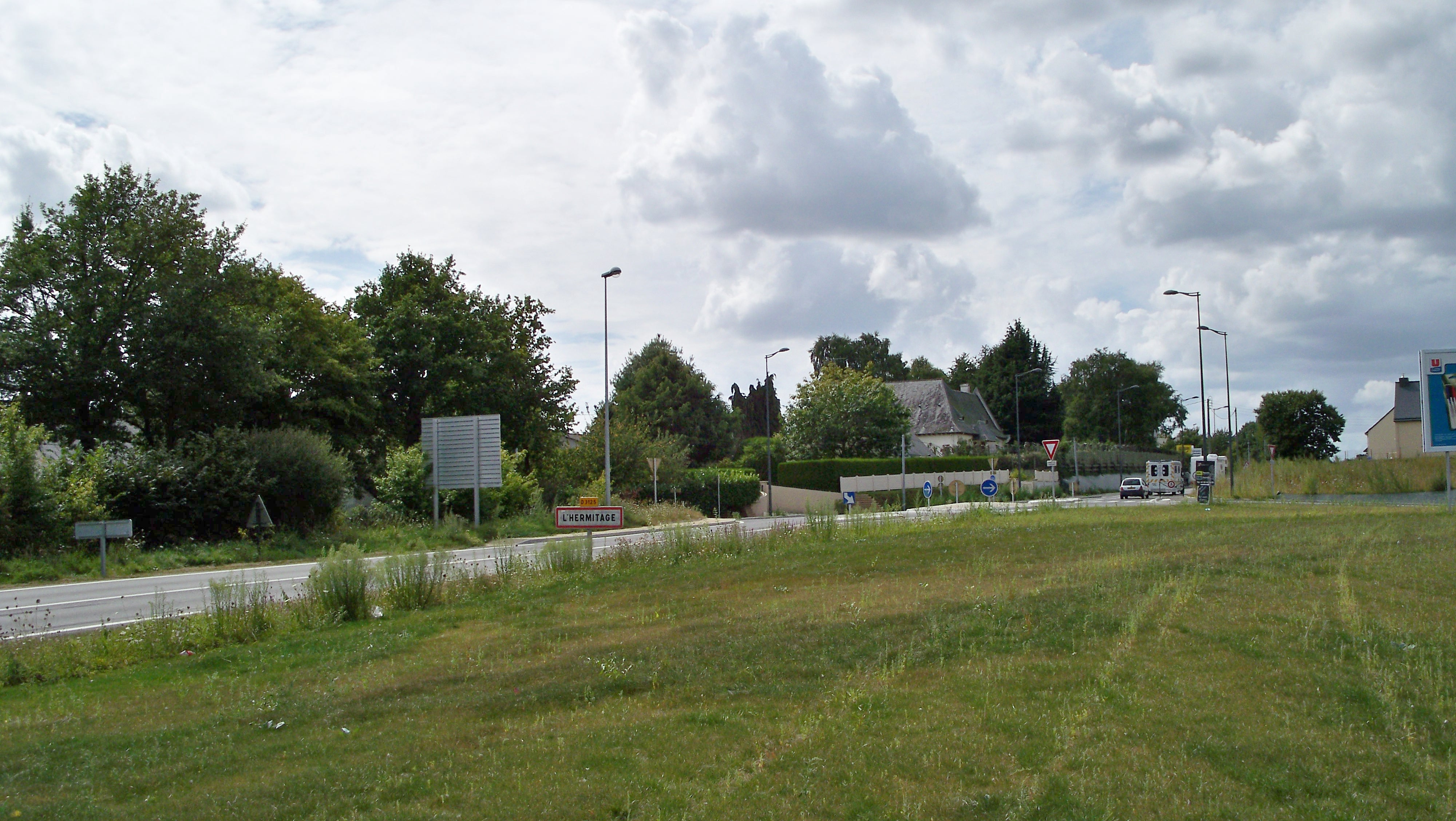 Entrée de l'Hermitage depuis la D312